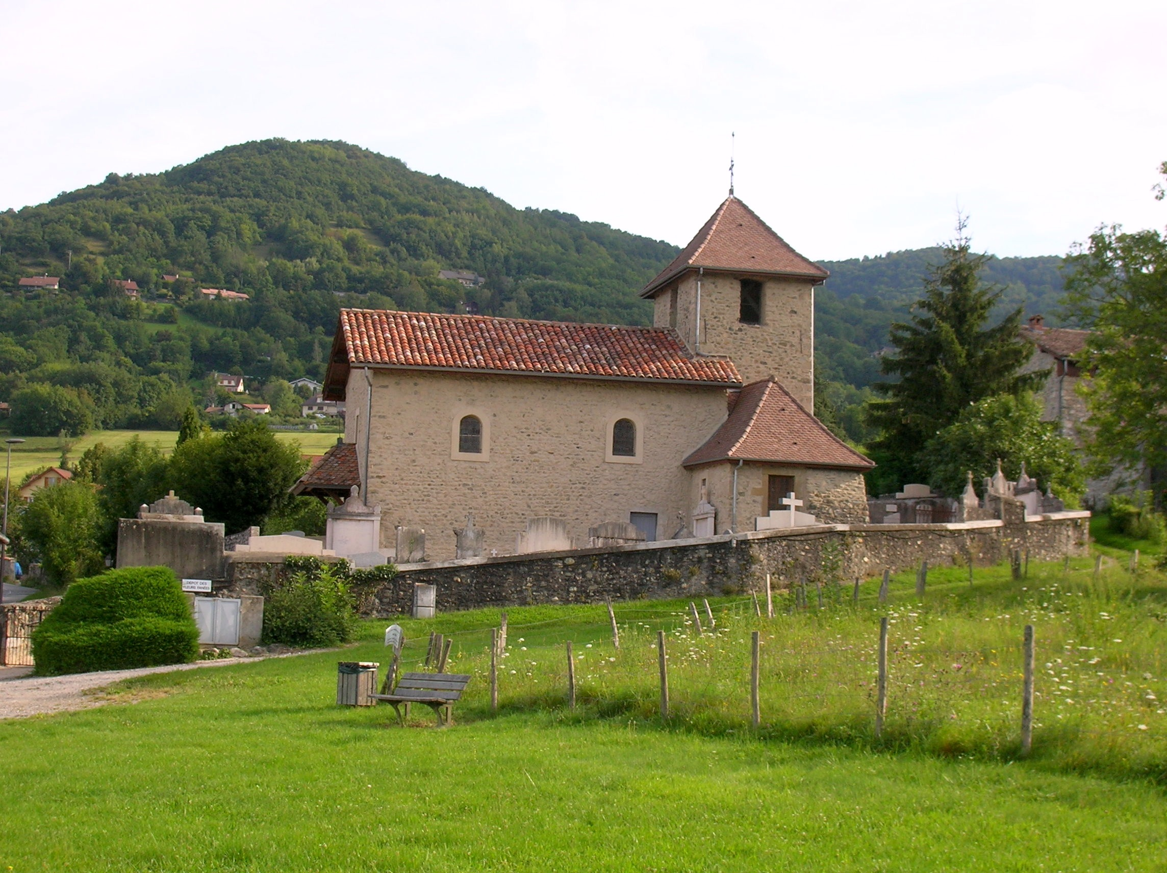 Chapelle des Angonnes, labelisée Patrimoine de l'Isère, à Brié-et-Angonnes, Isère, Rhone-Alpes, France.